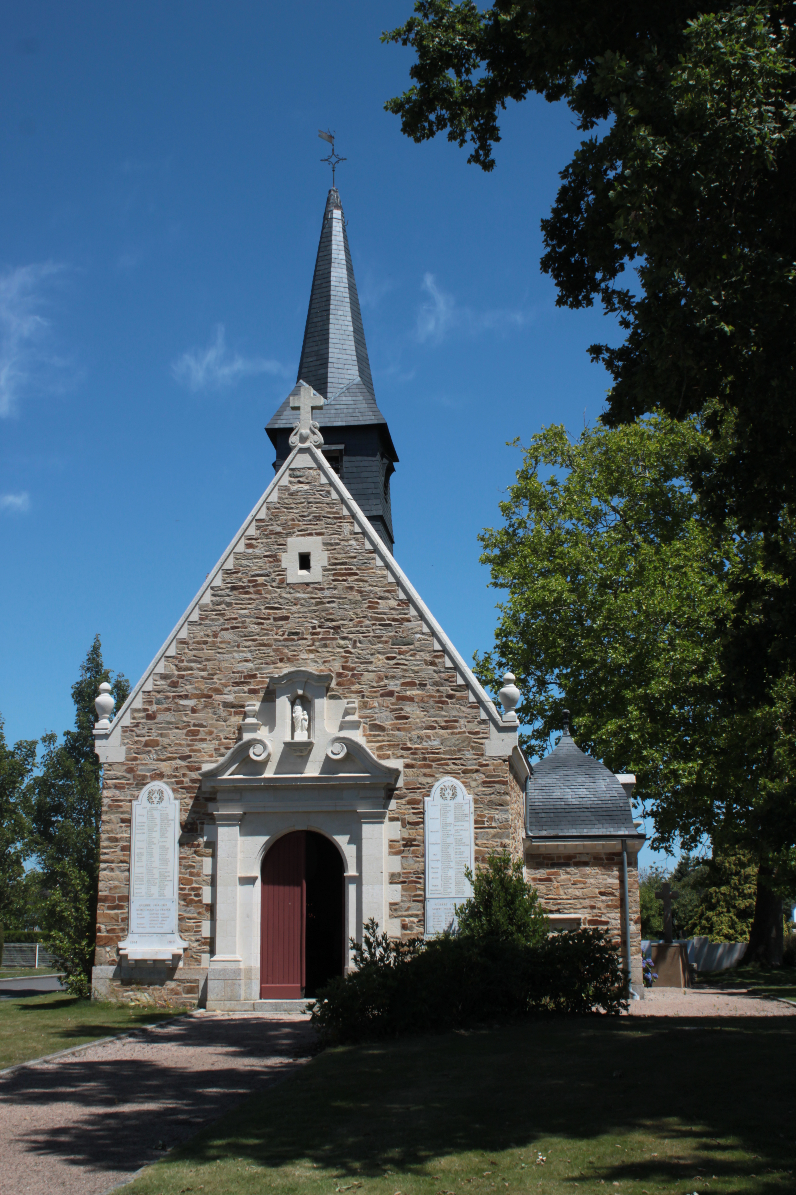 Église Sainte-Anne, 1695, Sainte-Anne-sur-Brivet.